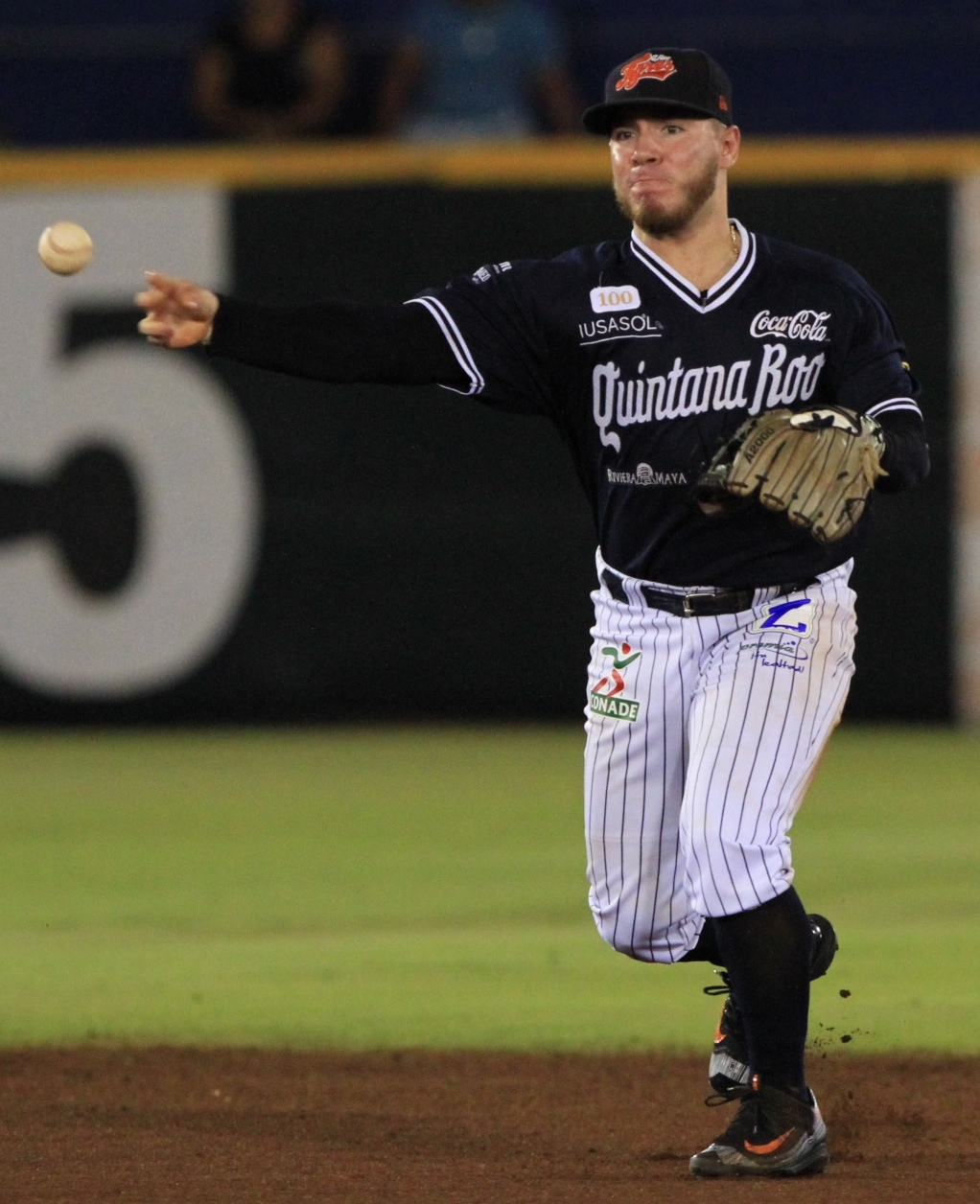 Esteban Quiroz